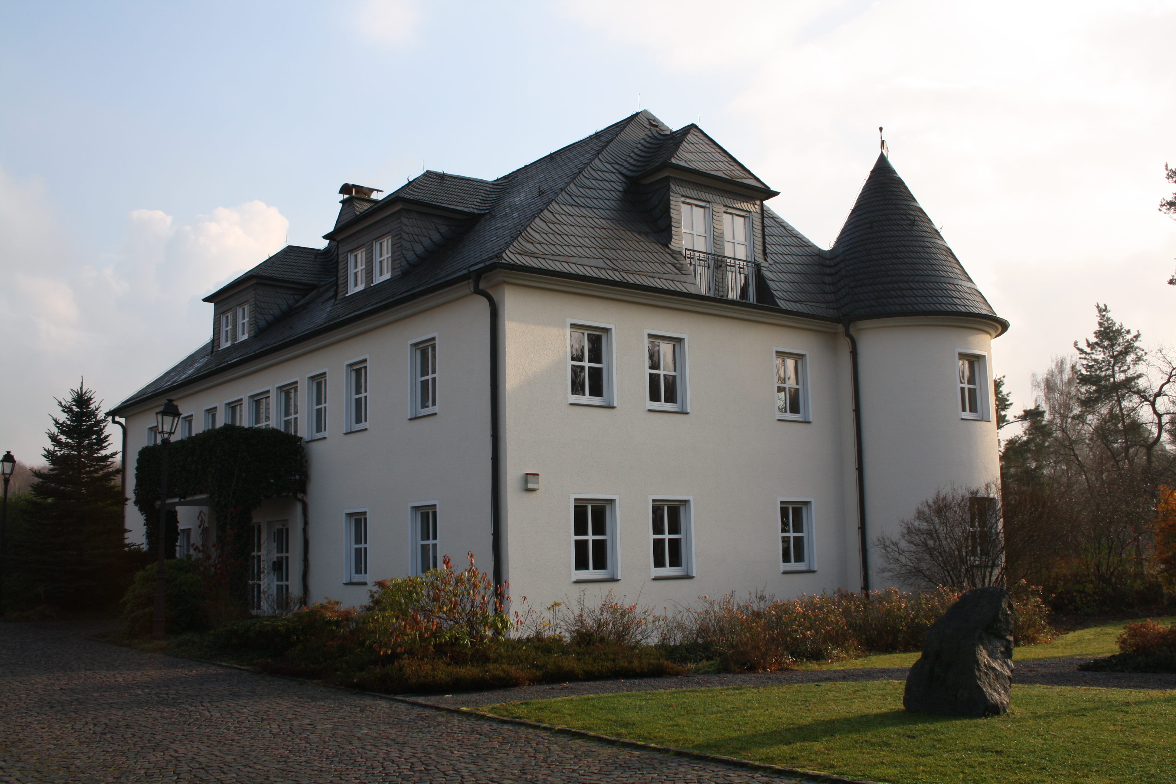 Unternehmenszentrale der Mitteldeutschen Hartstein-Industrie AG in Hanau